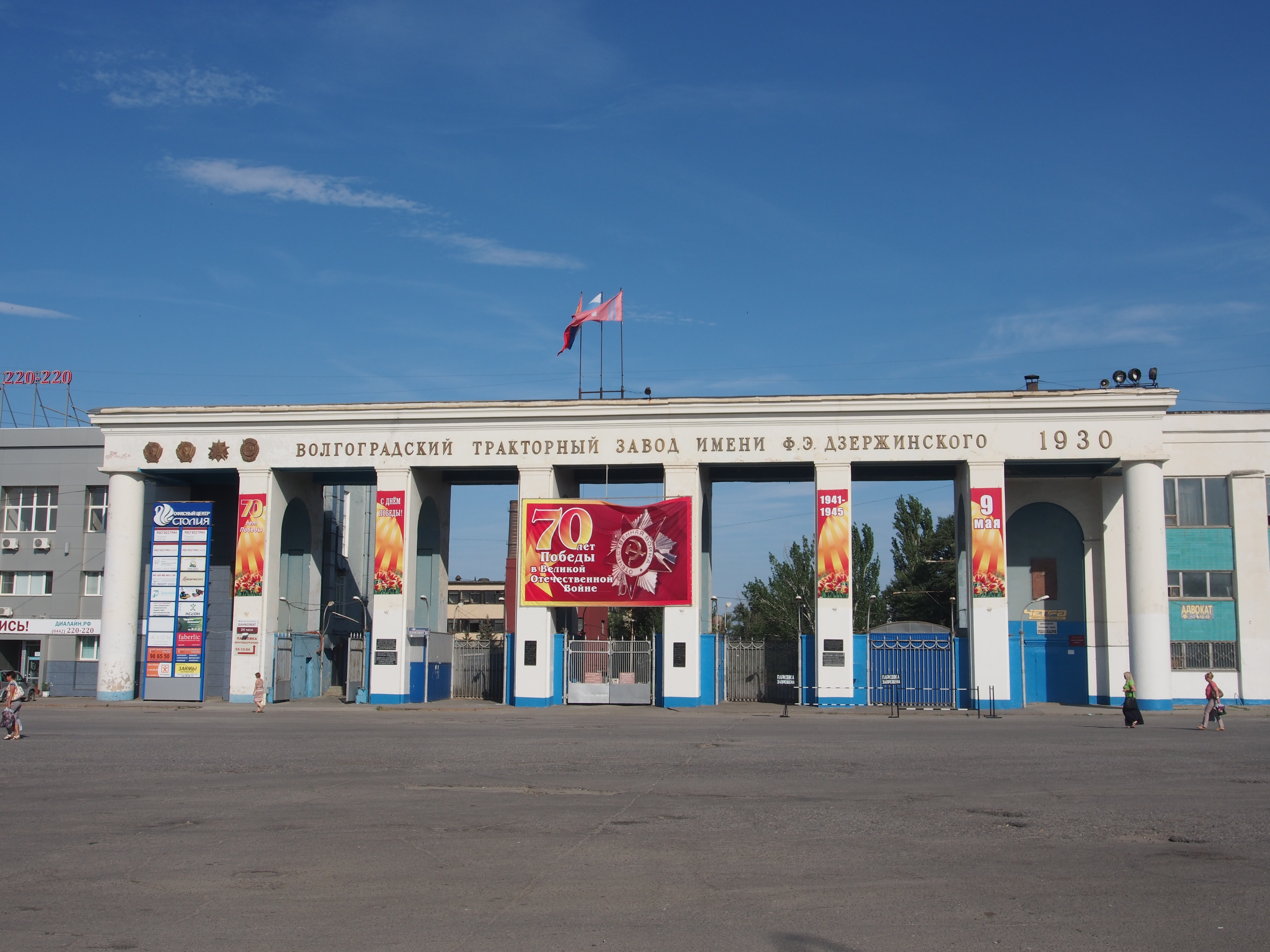 Проходные ВгТЗ